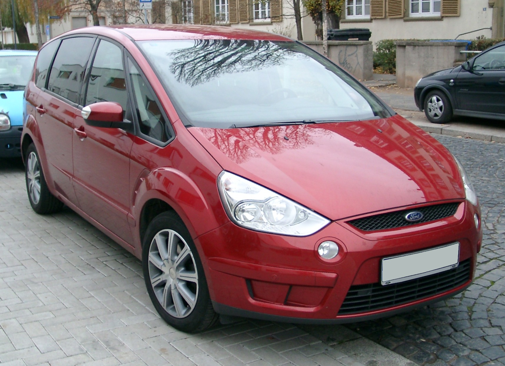 Ford S-Max